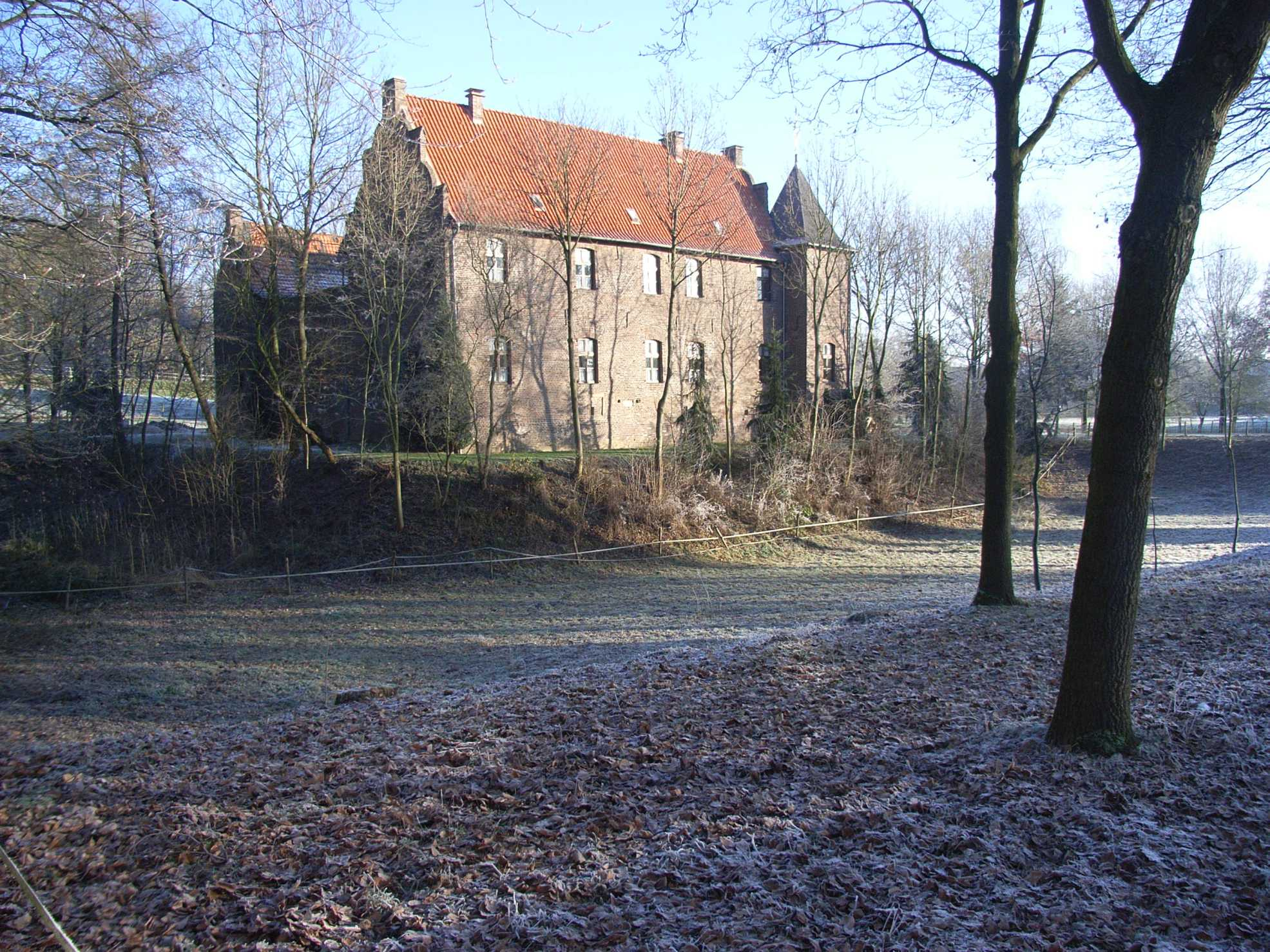 Haus Paland und ehemaliger Wassergraben in Erkelenz-Borschemich, NRW